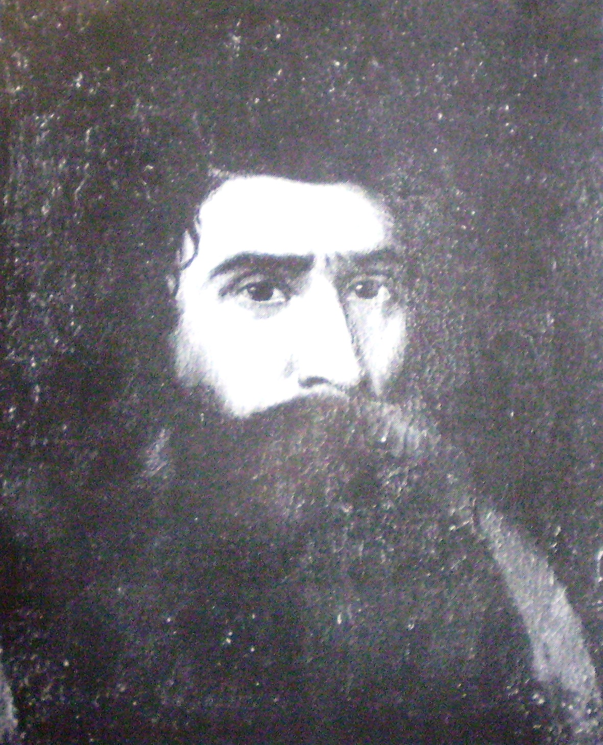 Ciriaco Cuitiño, óleo de Prilidiano Pueyrredón (1823-!1870) Museo Histórico Nacional